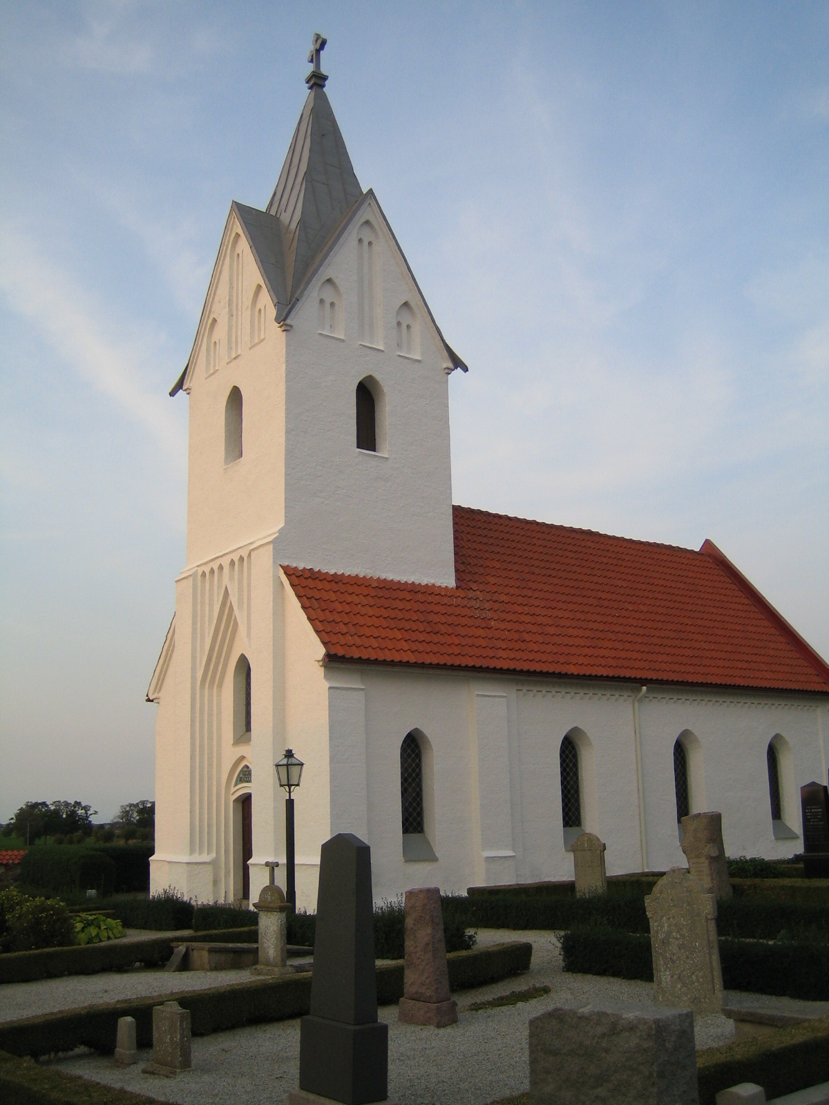 Simlinge kyrka